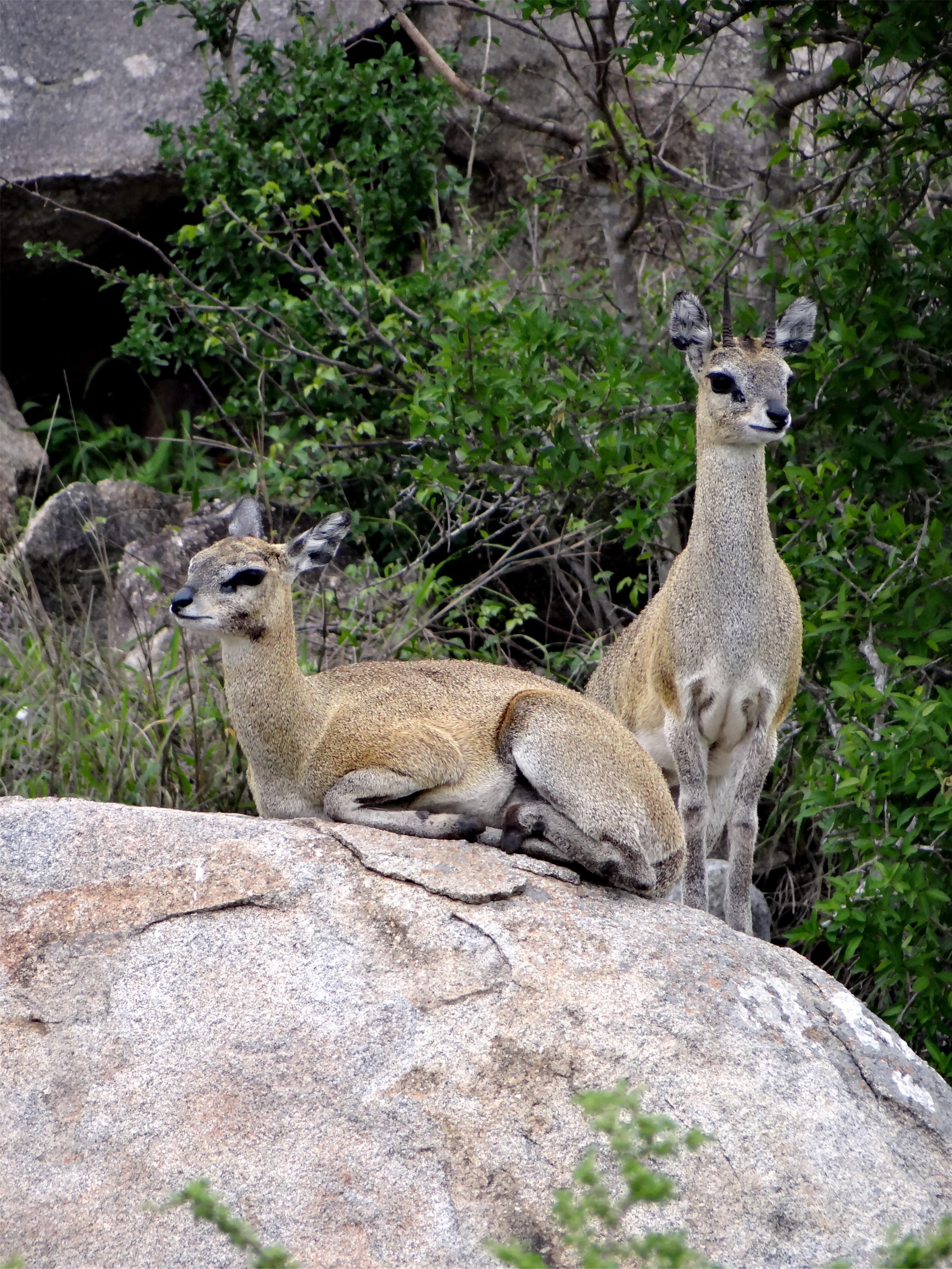 Oréotrague (Oreotragus oreotragus), Parc national Kruger, Afrique du Sud